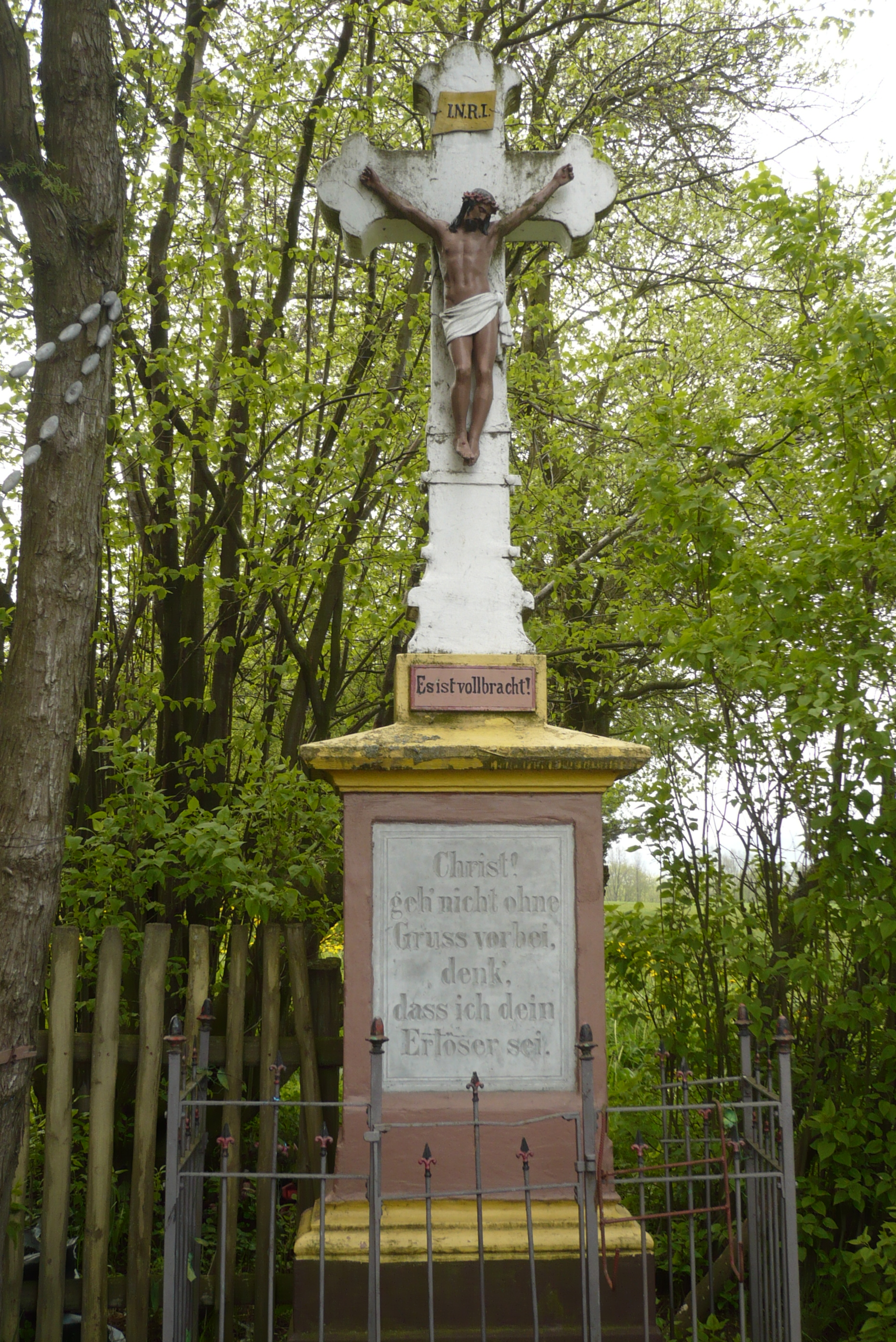 Ruszowice. Krzyż